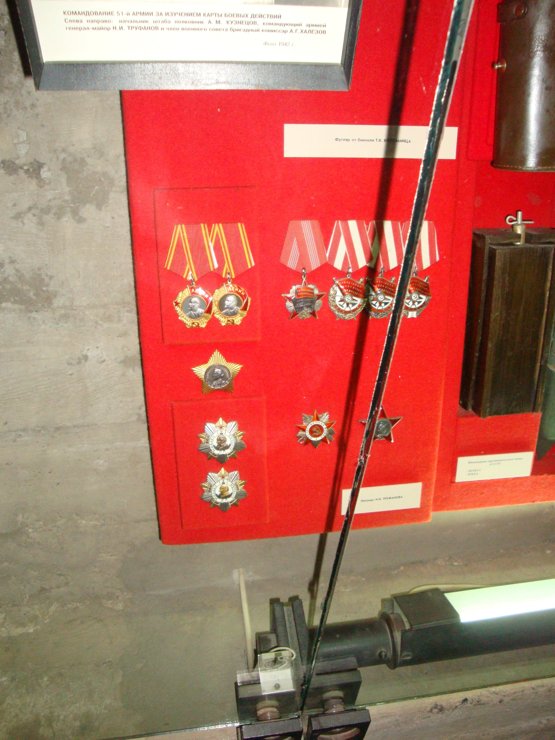 Награды Труфанова